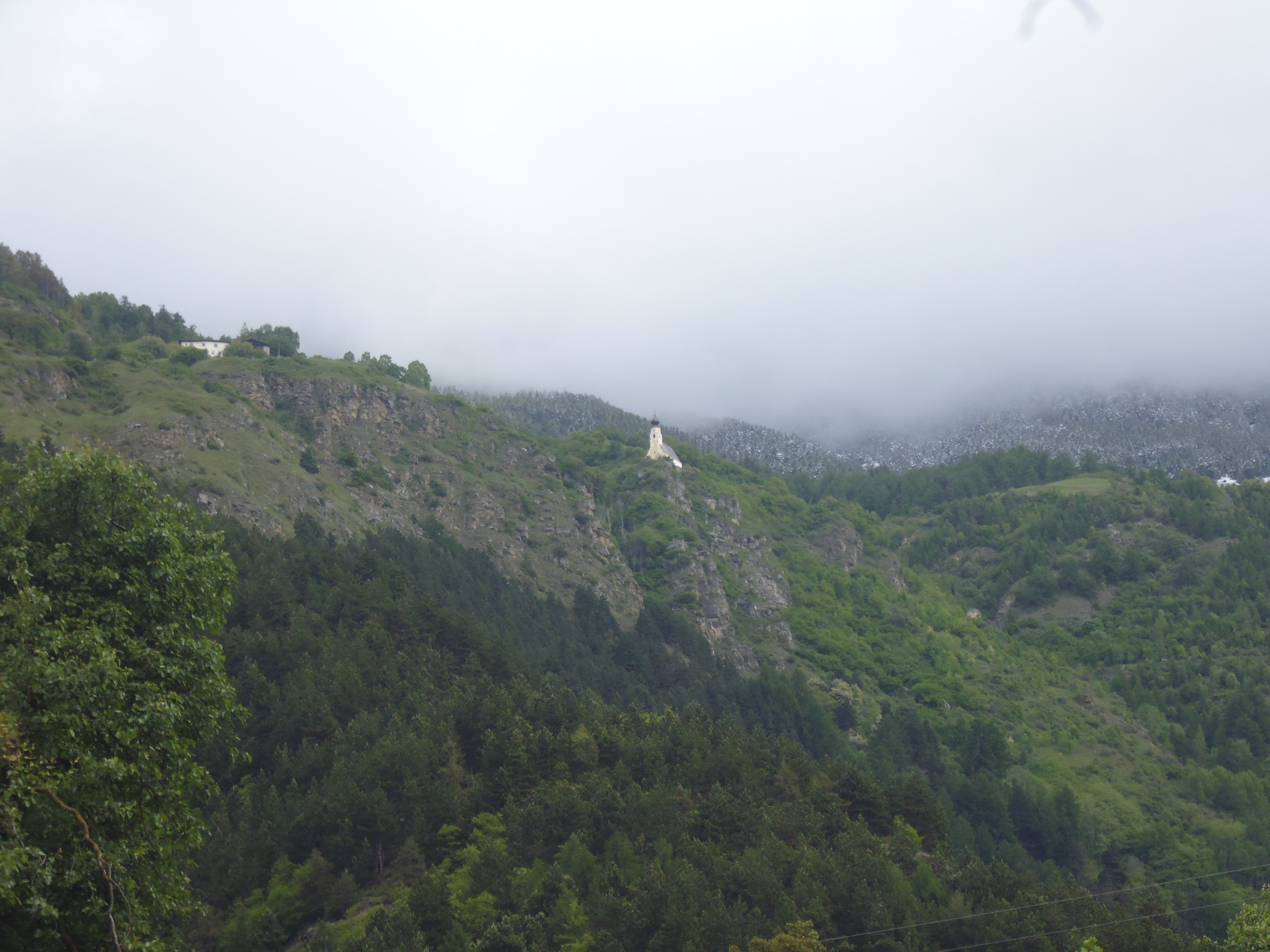 St. Peter bei Tanas (Laas)